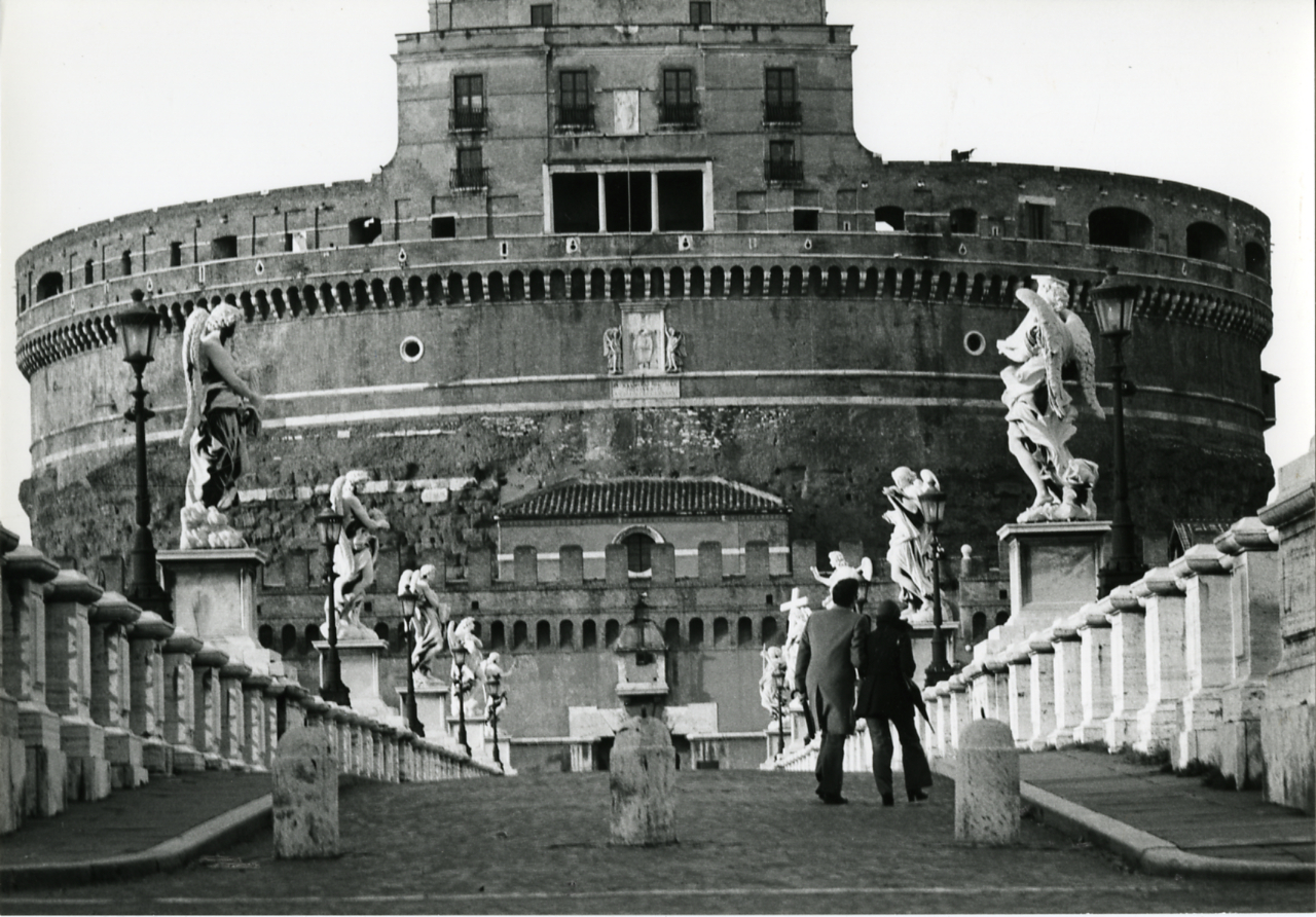 Città del Vaticano. Castel Sant'Angelo (Mausoleo di Adriano) e ponte Sant'Angelo. Servizio fotografico : Città del Vaticano, 1980 / Paolo Monti. - Stampe: 4 : Positivo b/n, gelatina bromuro d'argento/ carta, 24x30. - ((Al verso delle stampe manoscritto: "Passetto del cardinale. Borgo S. Angelo", "Roma Castel S. A. 1966 298/7", "Roma Castel Sant'Angelo 2282", "3295/30 Roma/ Ponte di Castel Sant'Angelo/ Nikon 28mm". Sul coperchio della scatola manoscritto a pennarello nero: "Roma/ Città storiche".